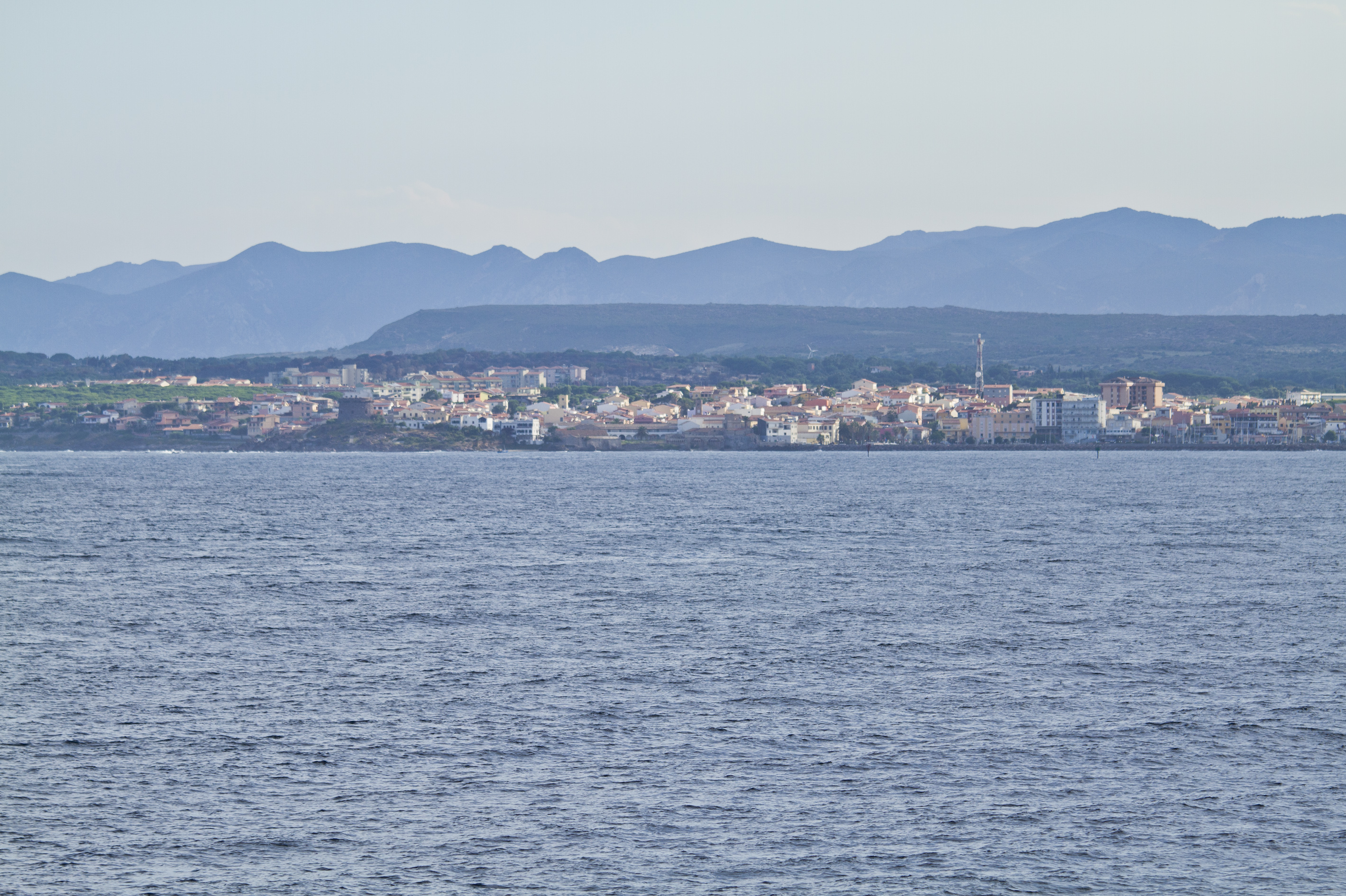 Portoscuso, Carbonia-Iglesias, Sardinia, Italy